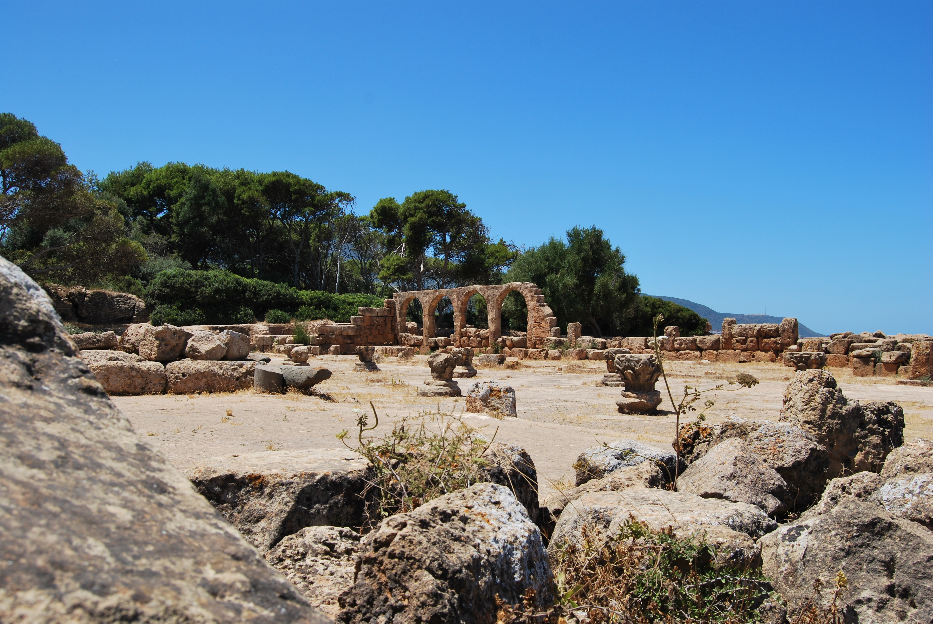 sites historiques tipaza